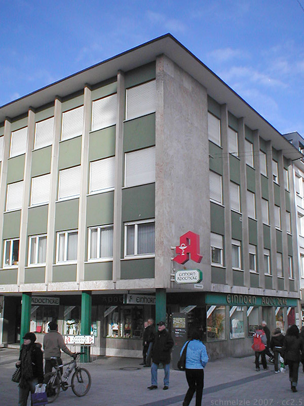 Einhorn-Apotheke am Hafenmarkt in Heilbronn.